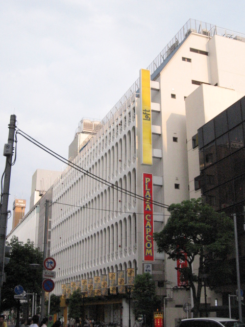 Loft Kichijoji